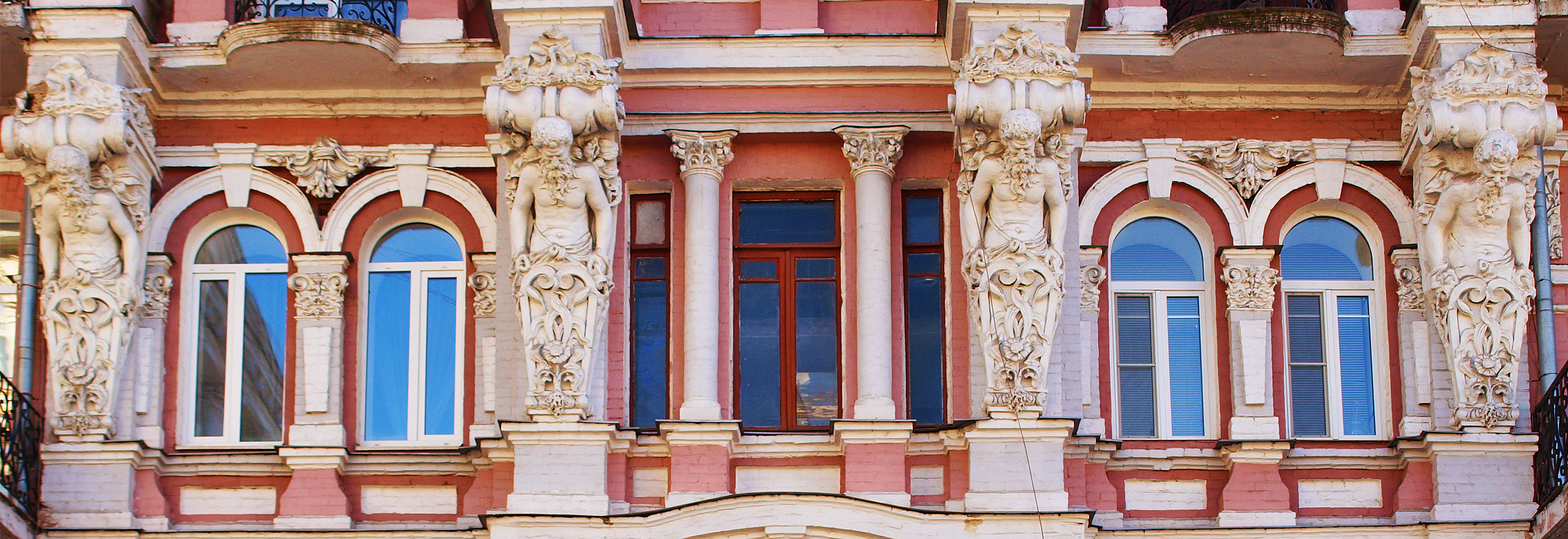 Будинок Майкапар, Лютеранська вул., 6. Київ